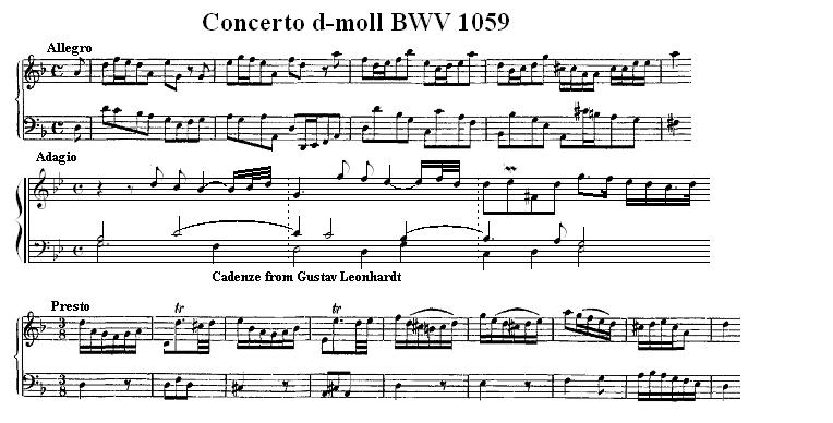 Тема концерта ре минор BWV 1059